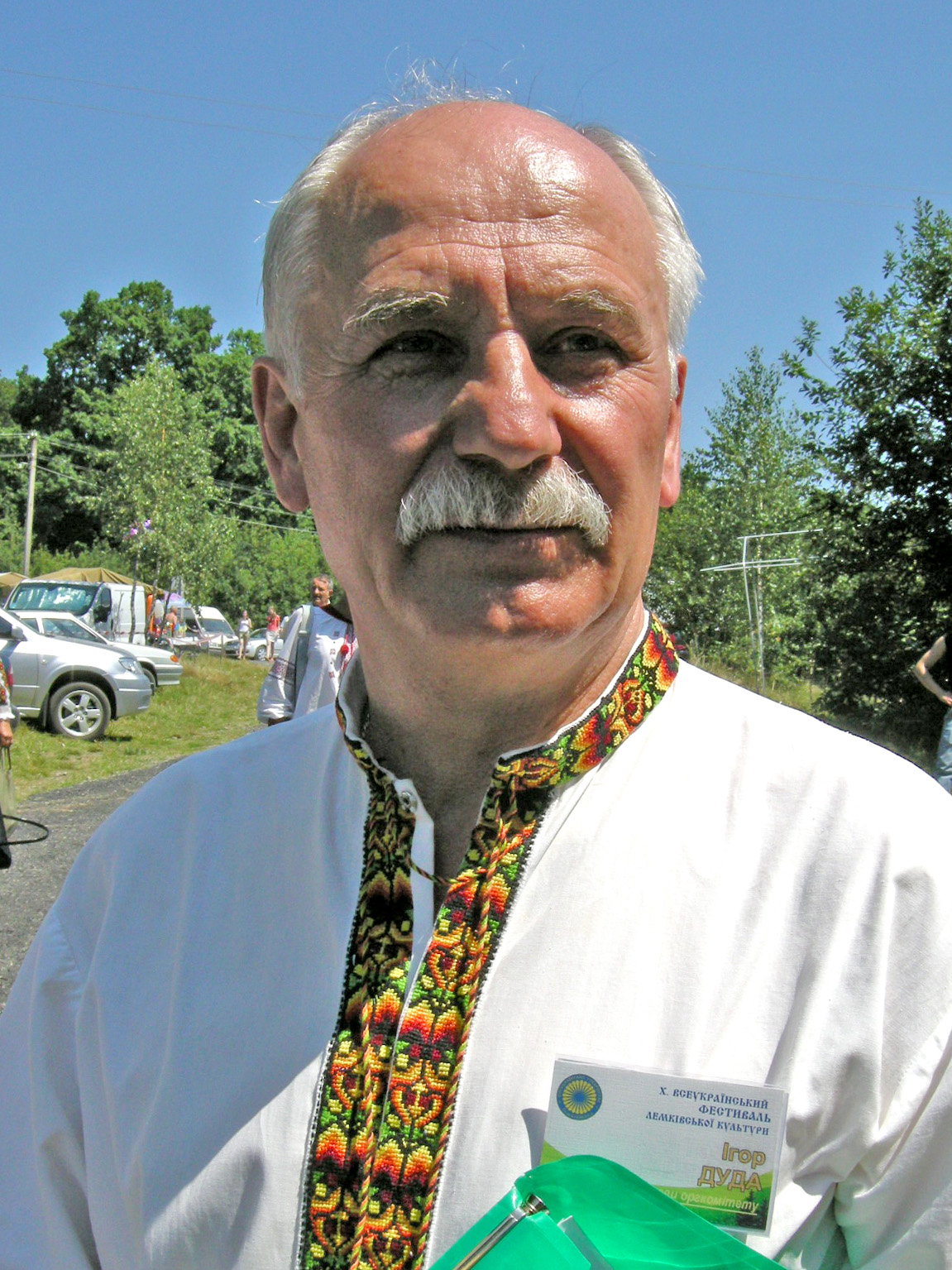 Український мистецтвознавець, краєзнавець, педагог, діяч культури Ігор Дуда на Всеукраїнському фестивалі лемківської культури «Дзвони Лемківщини» в урочище «Бичова» біля Монастириськ.